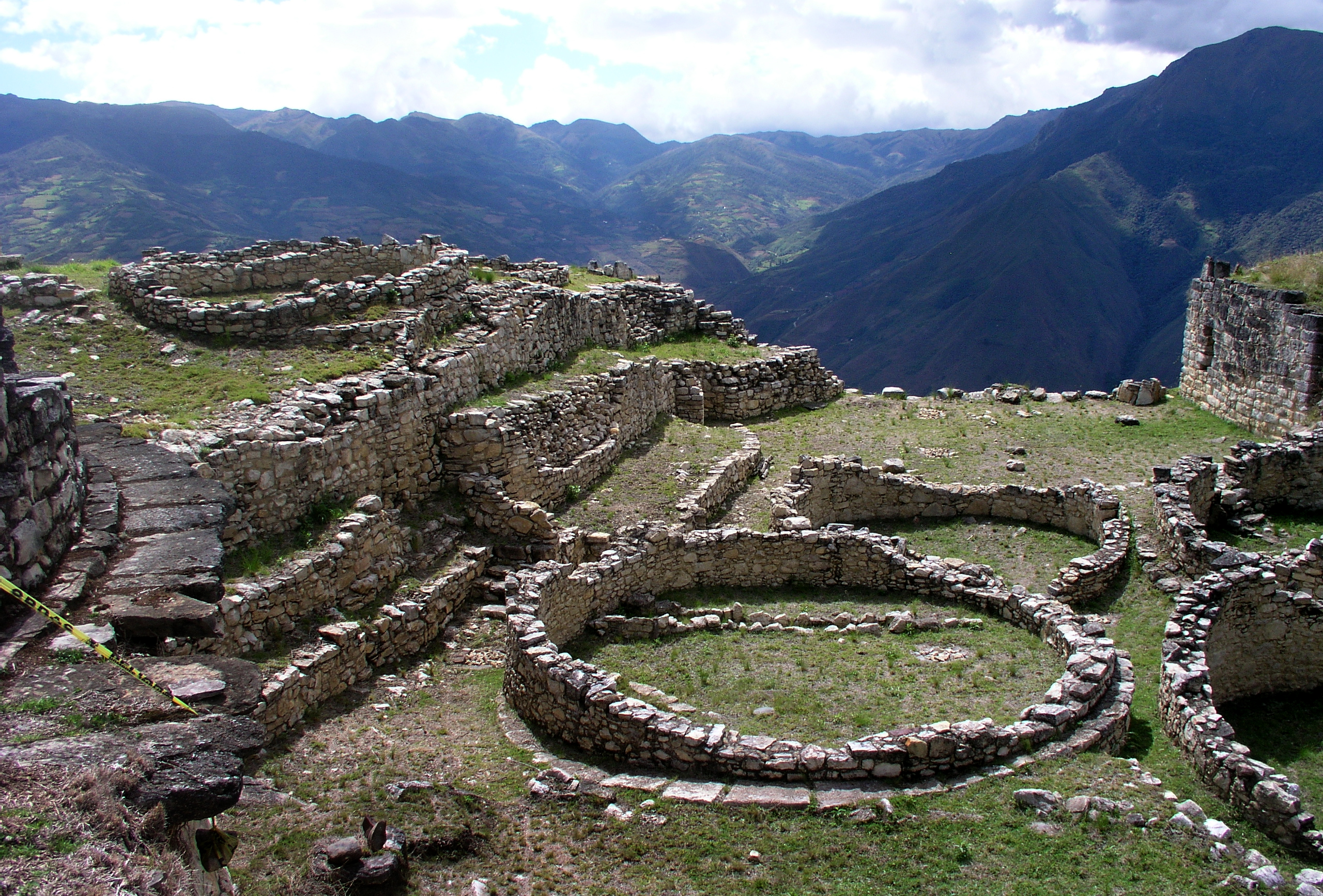 Fortaleza de Kuelap, Luya, Amazonas, Peru.